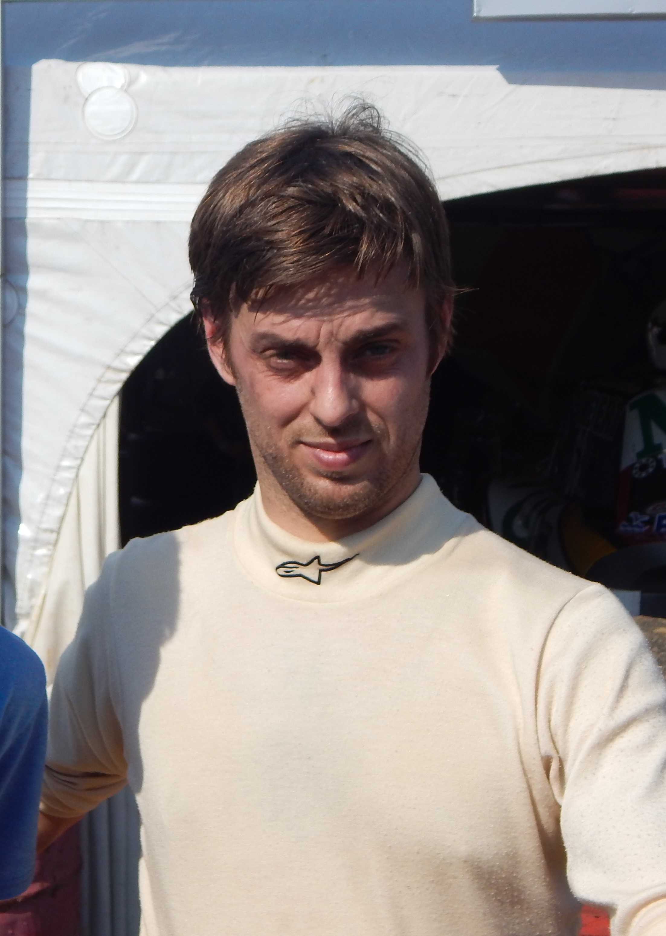 Próspero Bonelli Paraná 2015